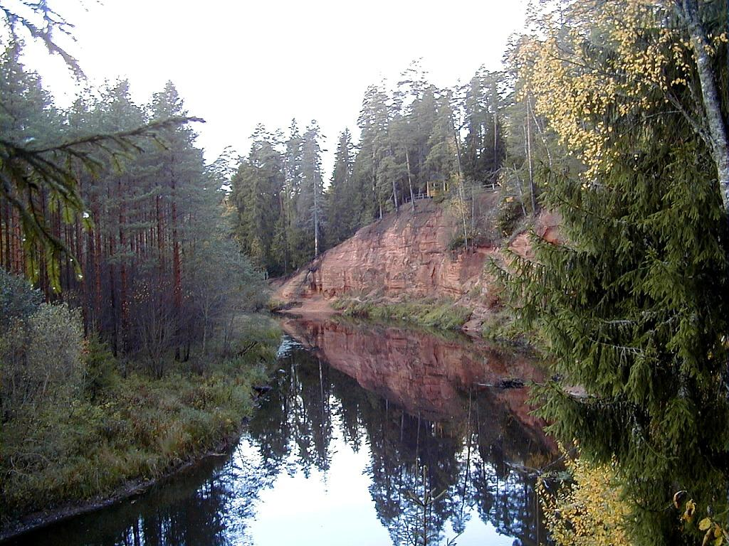 Mazsalaca, Neļķu klintis 1999-10-09